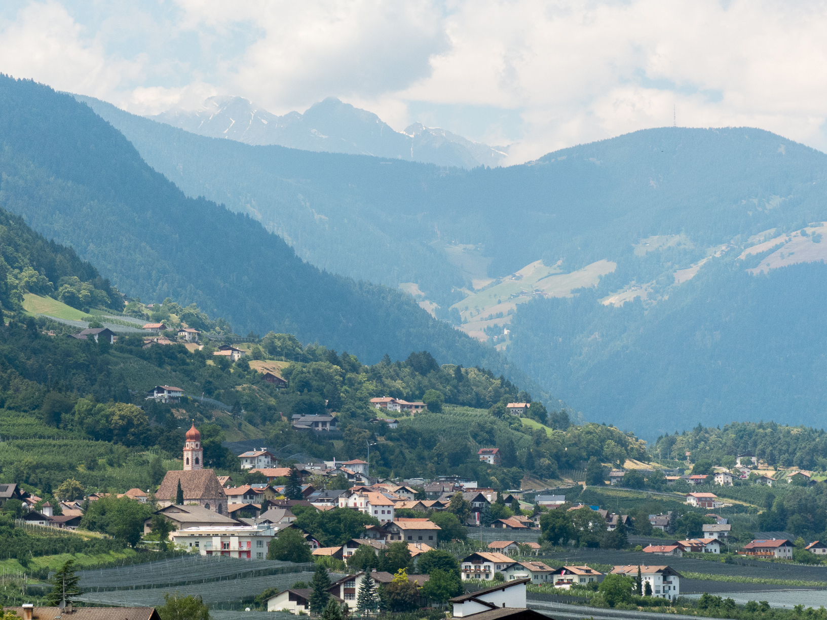 Blick nach Tisens, Prissian, Jakobsweg zwischen Meran und Bozen, Südtirol, Italien